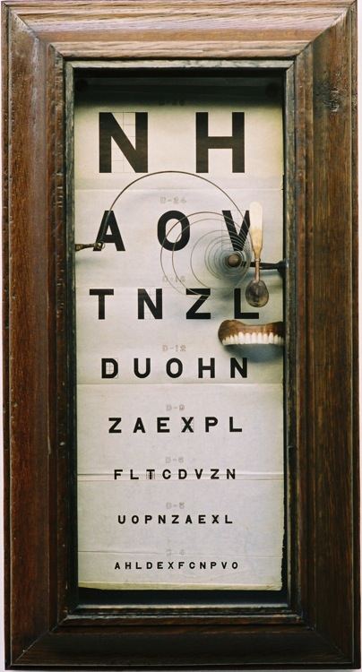 Vorwarts!_(Go_Forward!),_1897,57.5 x 31 x 9.5 cm